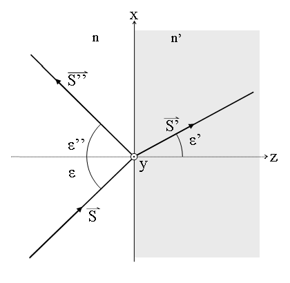 representación de difracción y reflexión. Ley de Fresnel. Fresnel Law.